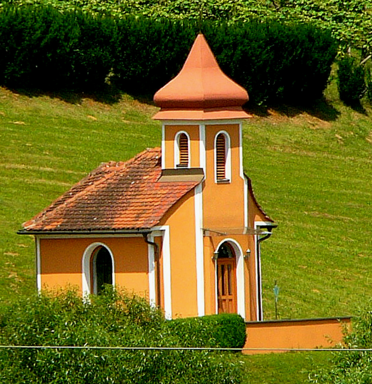 Kapelle im Rehgraben (Loipersdorf).